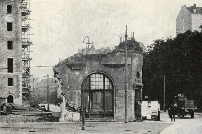 "Skandalhuset" vid Birger Jarls gatan revs äntligen 1925. Den sista, mest trafikhindrande delen av huset hade dock svårt att lämna valplatsen.